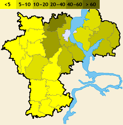 Chuvashs in Ulyanovsk Oblast